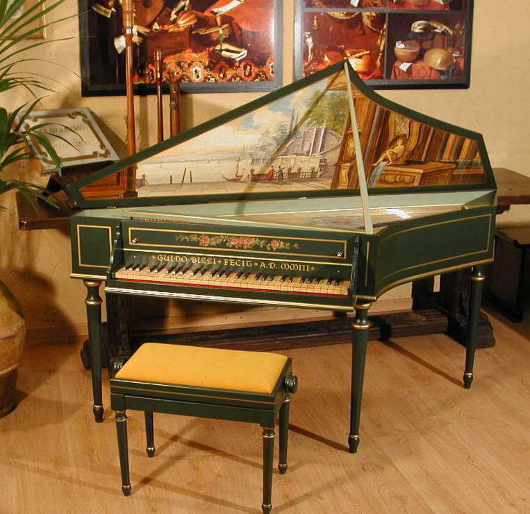 اسپینت